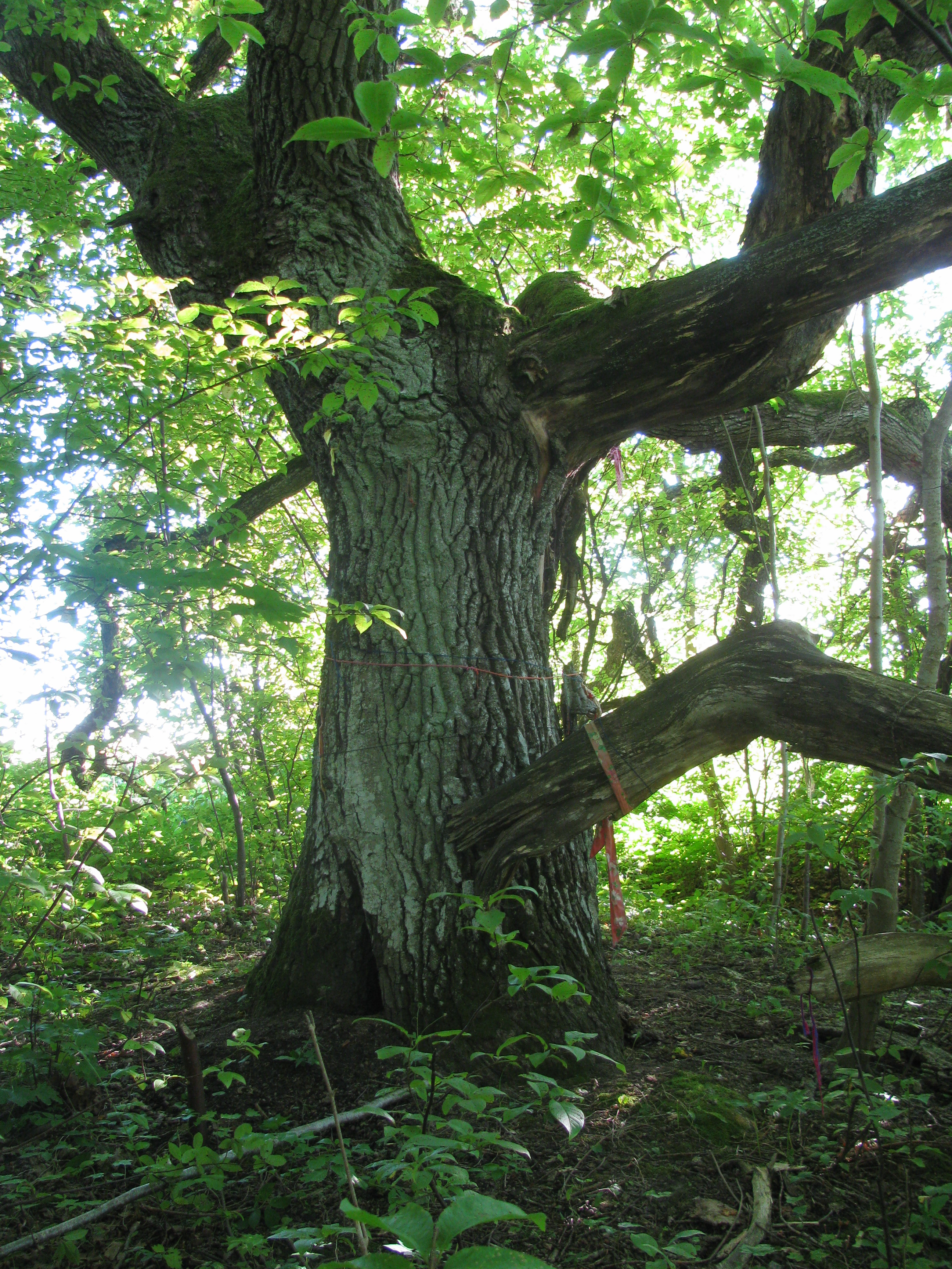 Vana-Vigala hiie tamm